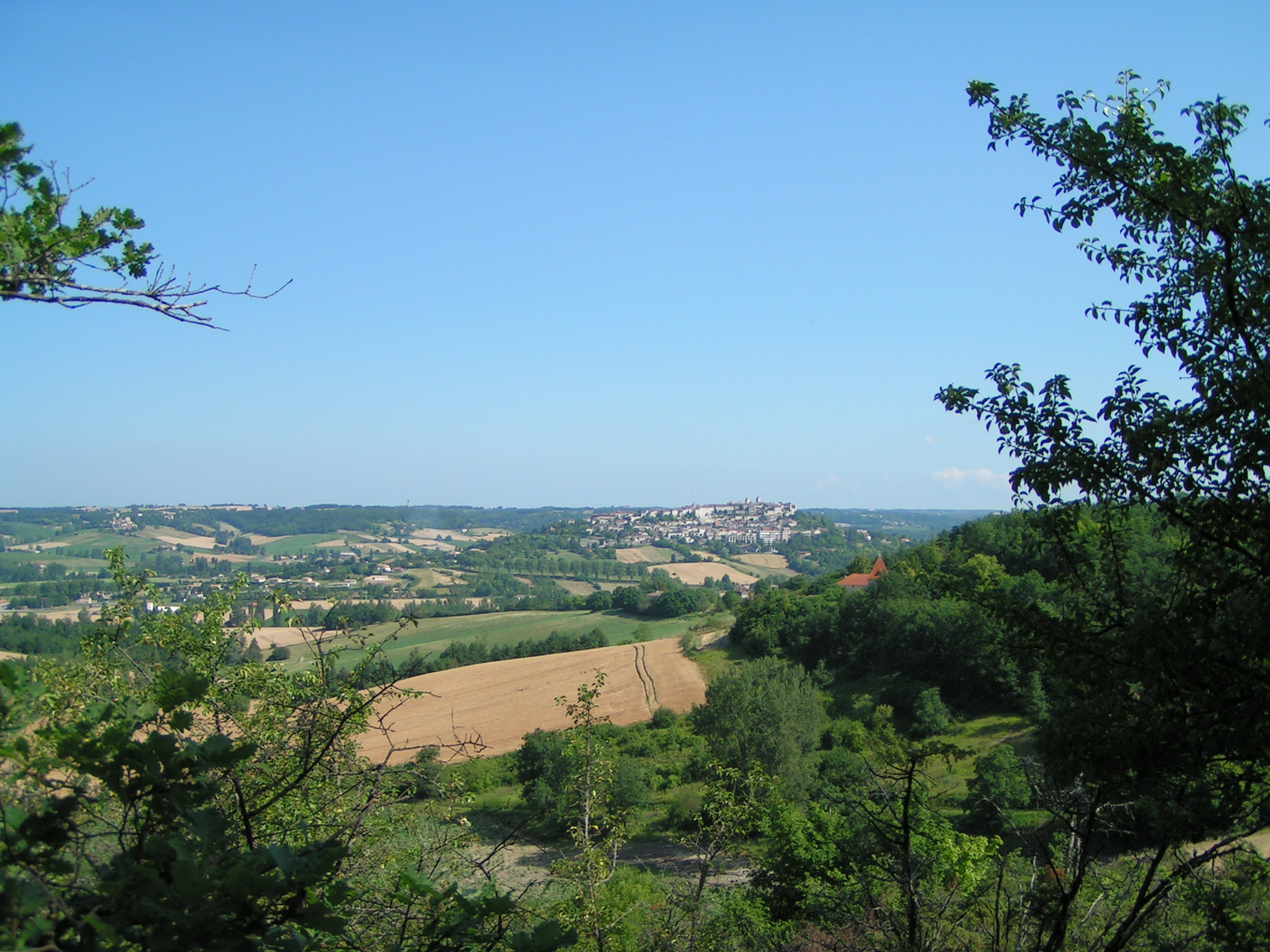 Lauzerte